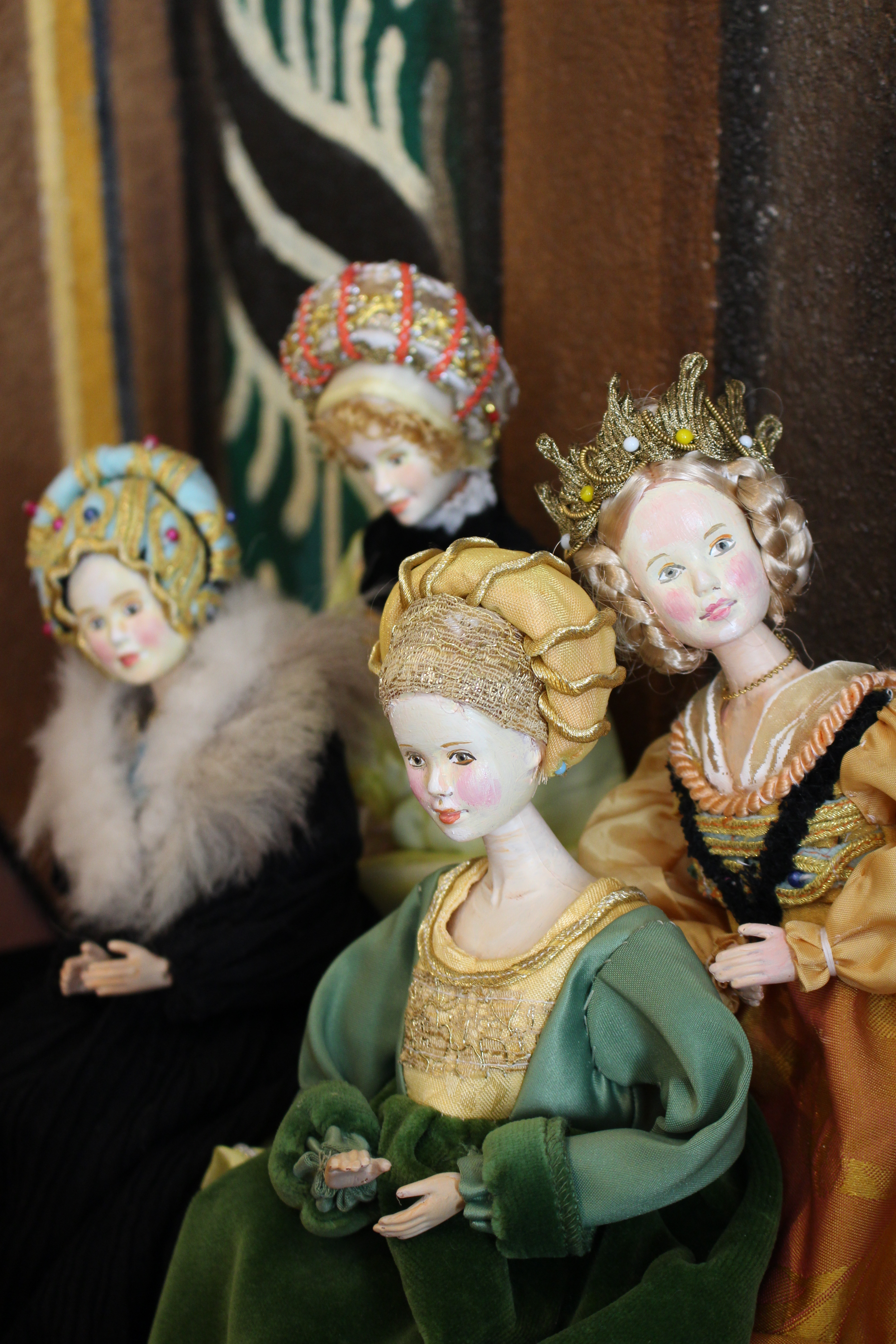 Die Ausstellung "Augsburger Geschlechtertanz" wurde von Ilse Wolf gefertigt. Urheberrecht bei Ilse Wolf. Bilddatei von Katja Morrison The Exhibition "Augsburger Geschlechtertanz" has been made by Ilse Wolf, all rights reserved. Picture by Katja Morrison